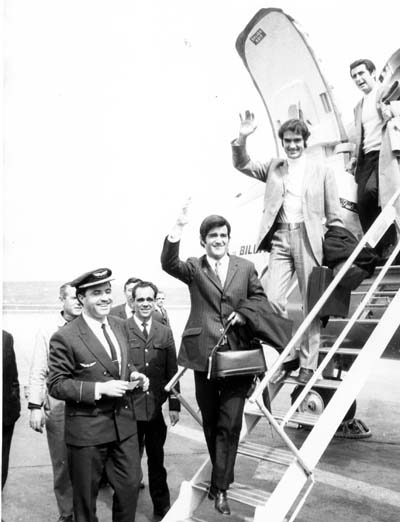 El Dúo Dinámico llegaba a Madrid tras ser premiados por la sociedad de autores por La, la, la